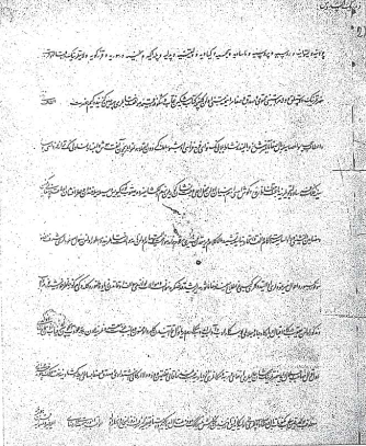 Saksoniya şahzadəsi və Polşa kralı olan Frixdrix Avqusta yazılmış azərbaycanca məktub